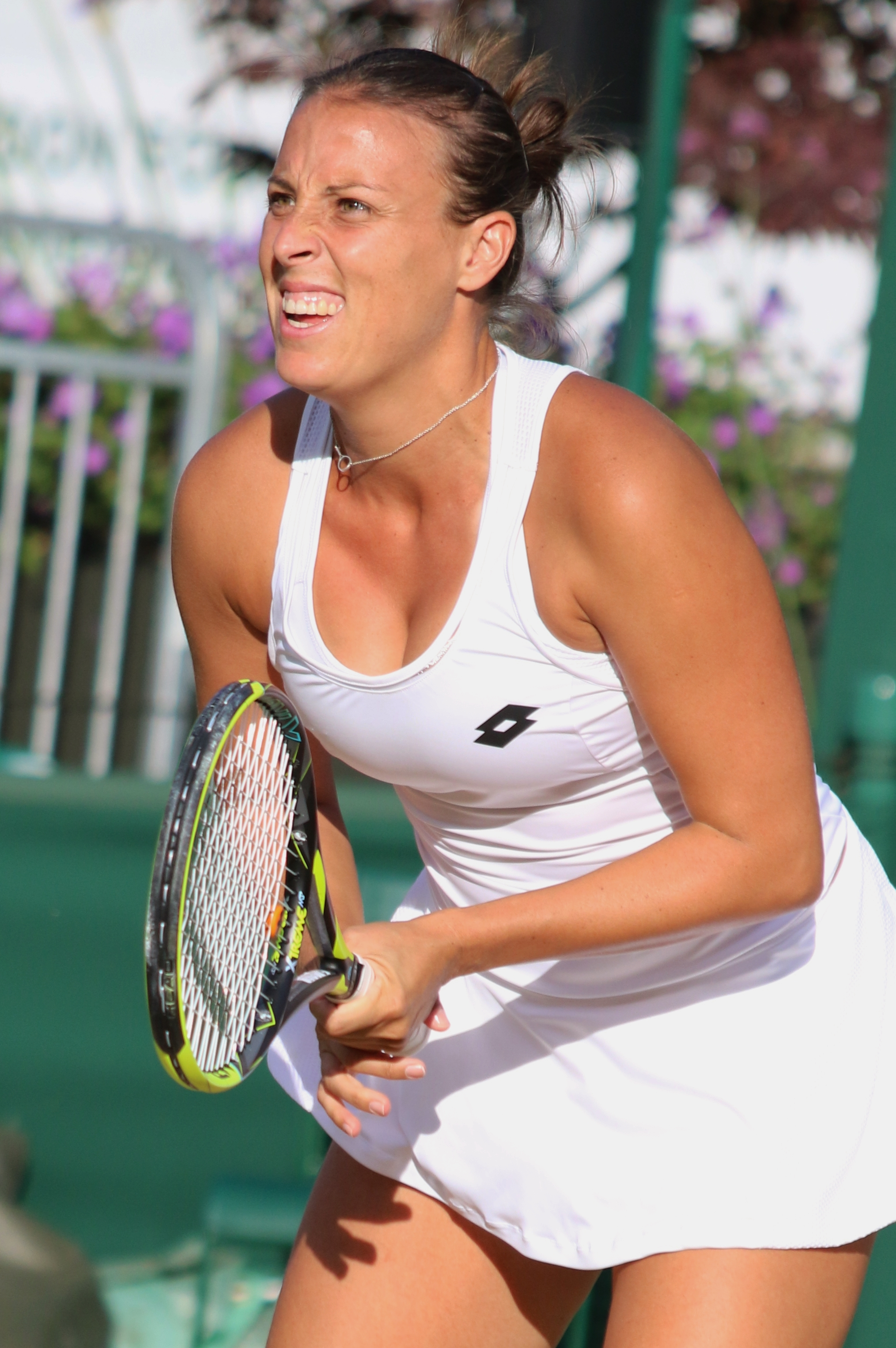 Klepac WM17 (7)